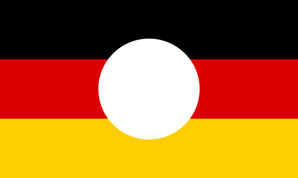 Bandiera della Repubblica Democratica Tedesca (Germania Est) senza lo stemma nazionale, utilizzato durante il periodo della riunificazione tedesca che sarebbe avvenuta il 3 ottobre 1990.